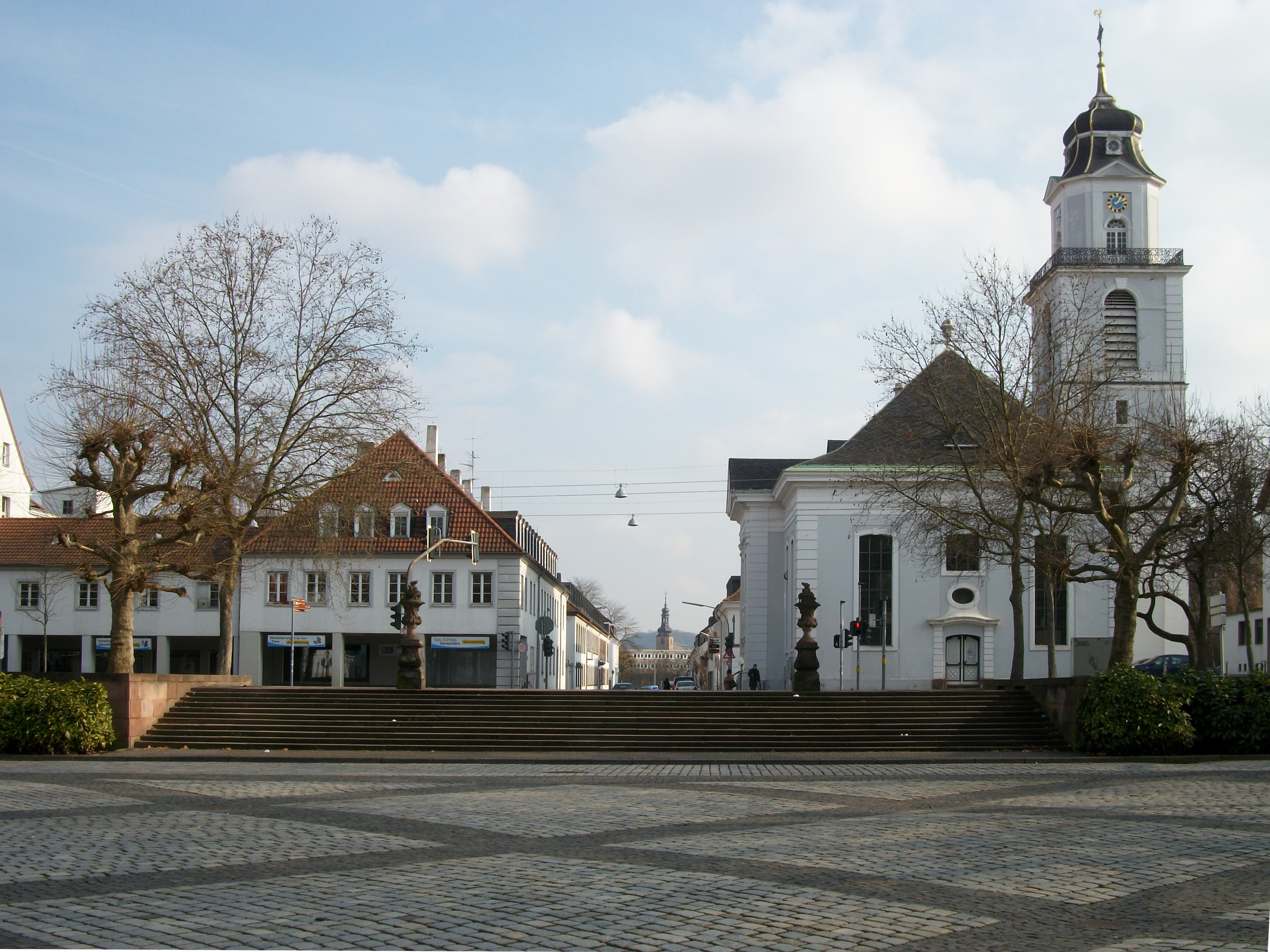 "Stengelachse" in Saarbrücken: Wilhelm-Heinrich-Str. mit Friedenskirche, alte ev. Kirche und Kaninchenberg im Hintergrund